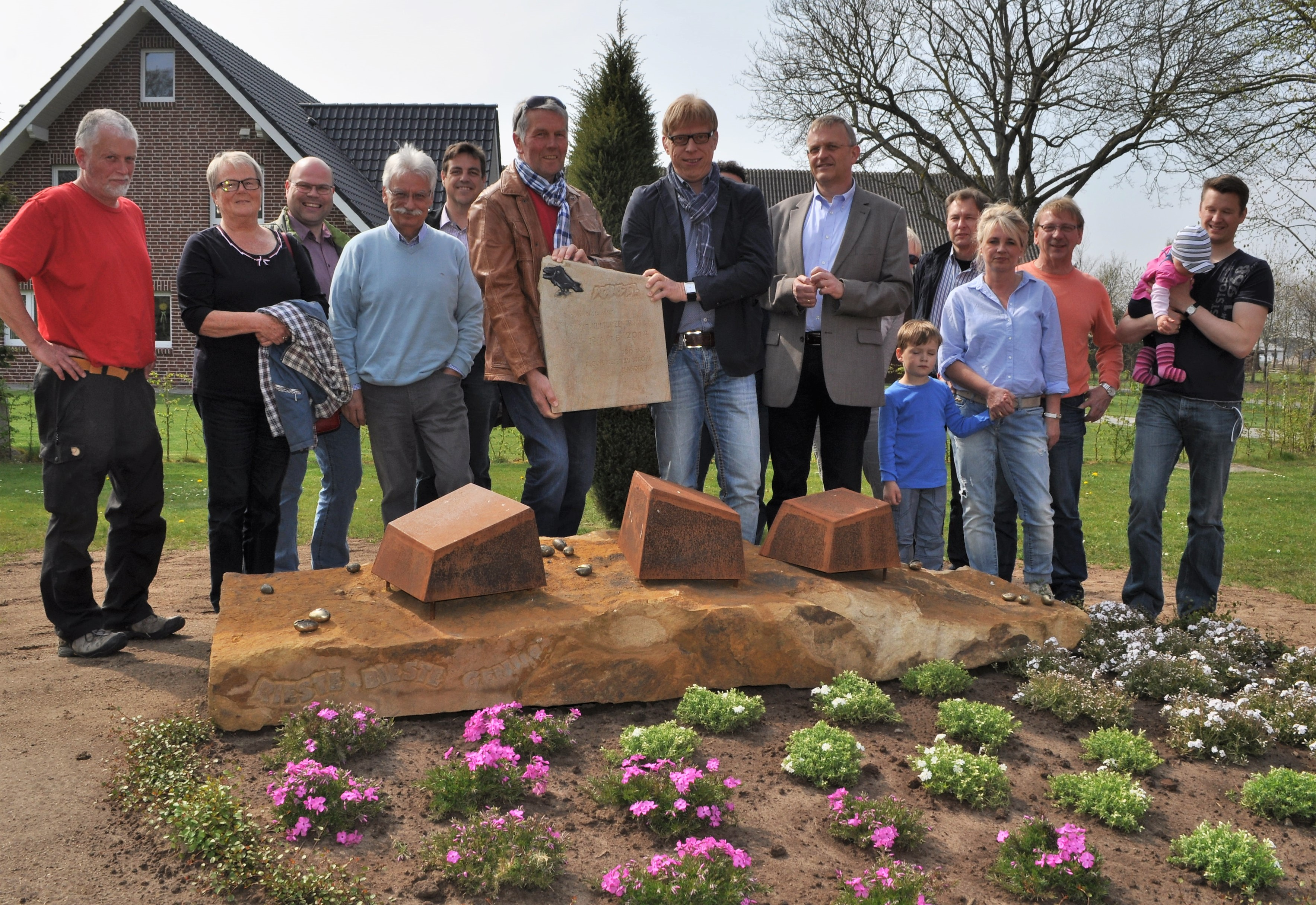 Die KRABAT-Stele wird im April 2015 eingeweiht